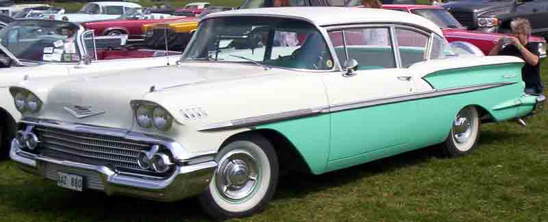 1958 Chevrolet Bel Air, Model 1747 2-door Hardtop